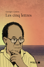 Caricature de Georges Castera sur son livre "Les Cinq lettres"